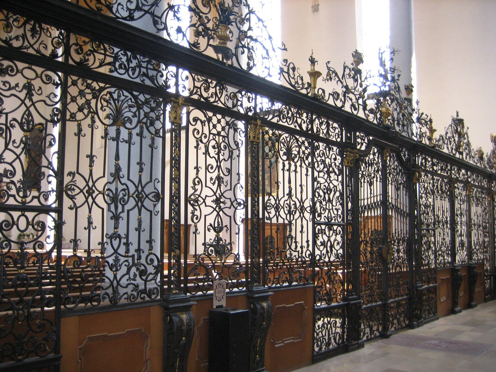 Augsburg, Kath. Heilig-Kreuz-Kirche, Gitter